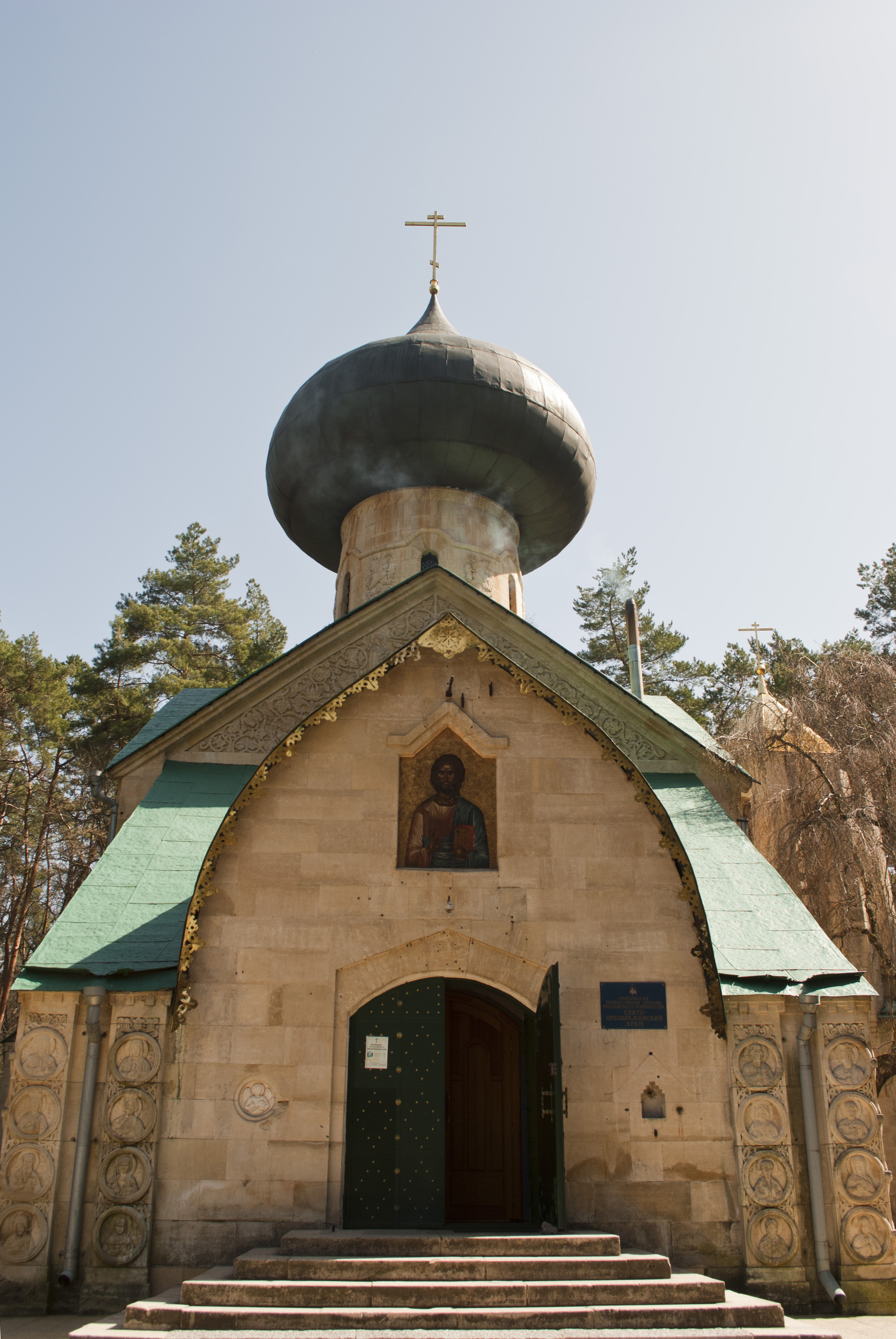 Спаська церква (мур.) (діюча), Володимирівка